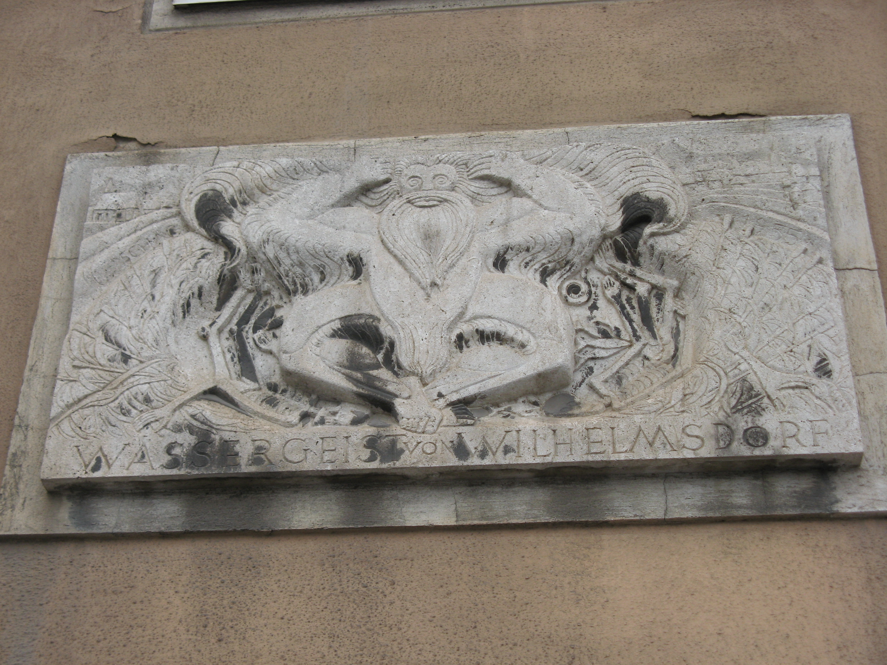 Der Wassergeist von Wilhelmsdorf, Natursteinrelief von Josef Schagerl, 1955, in der Eichenstraße 50-52, Wien-Meidling This media shows the Vienna residential building (Gemeindebau) with the ID 908.